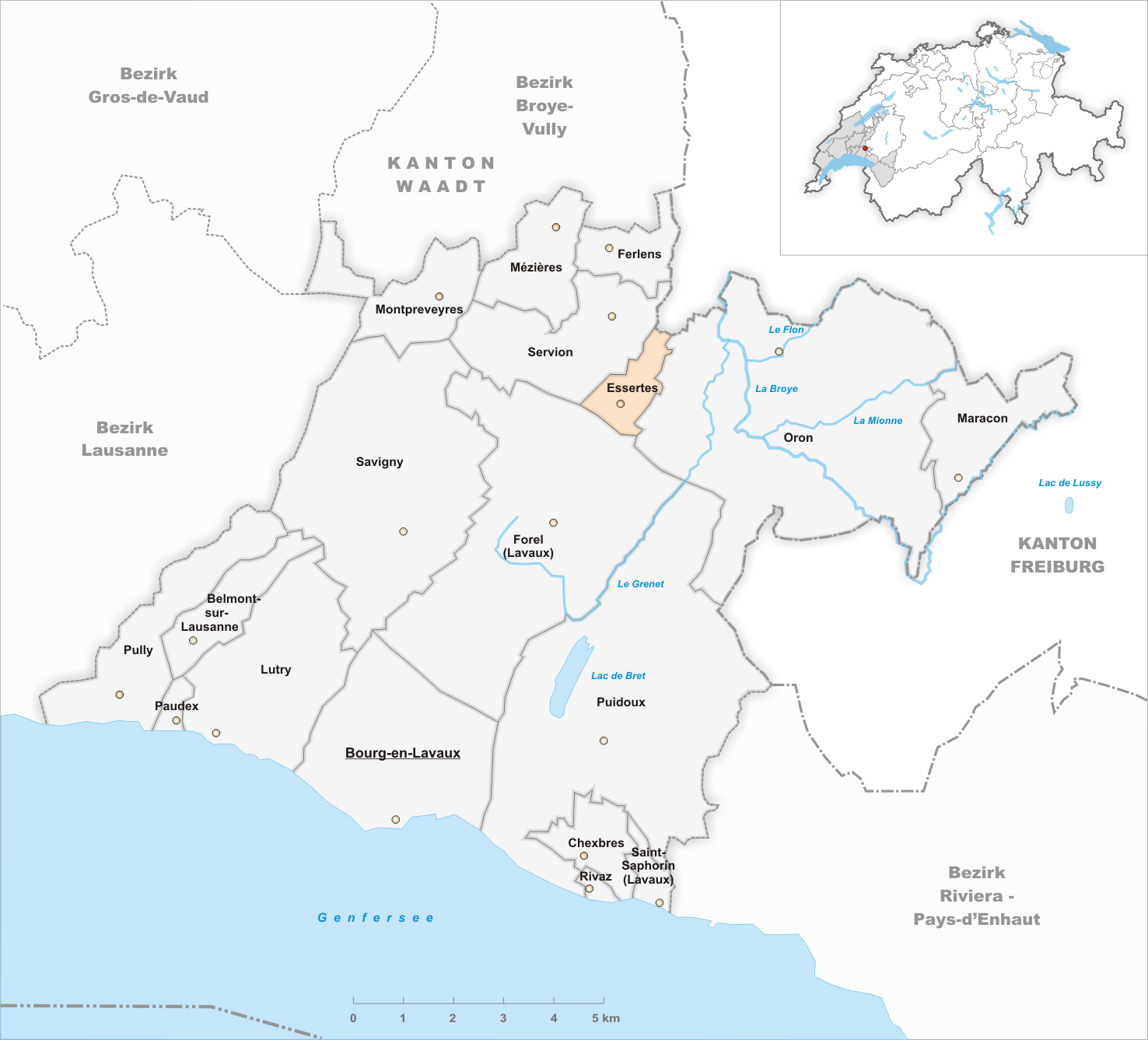 Municipality Essertes